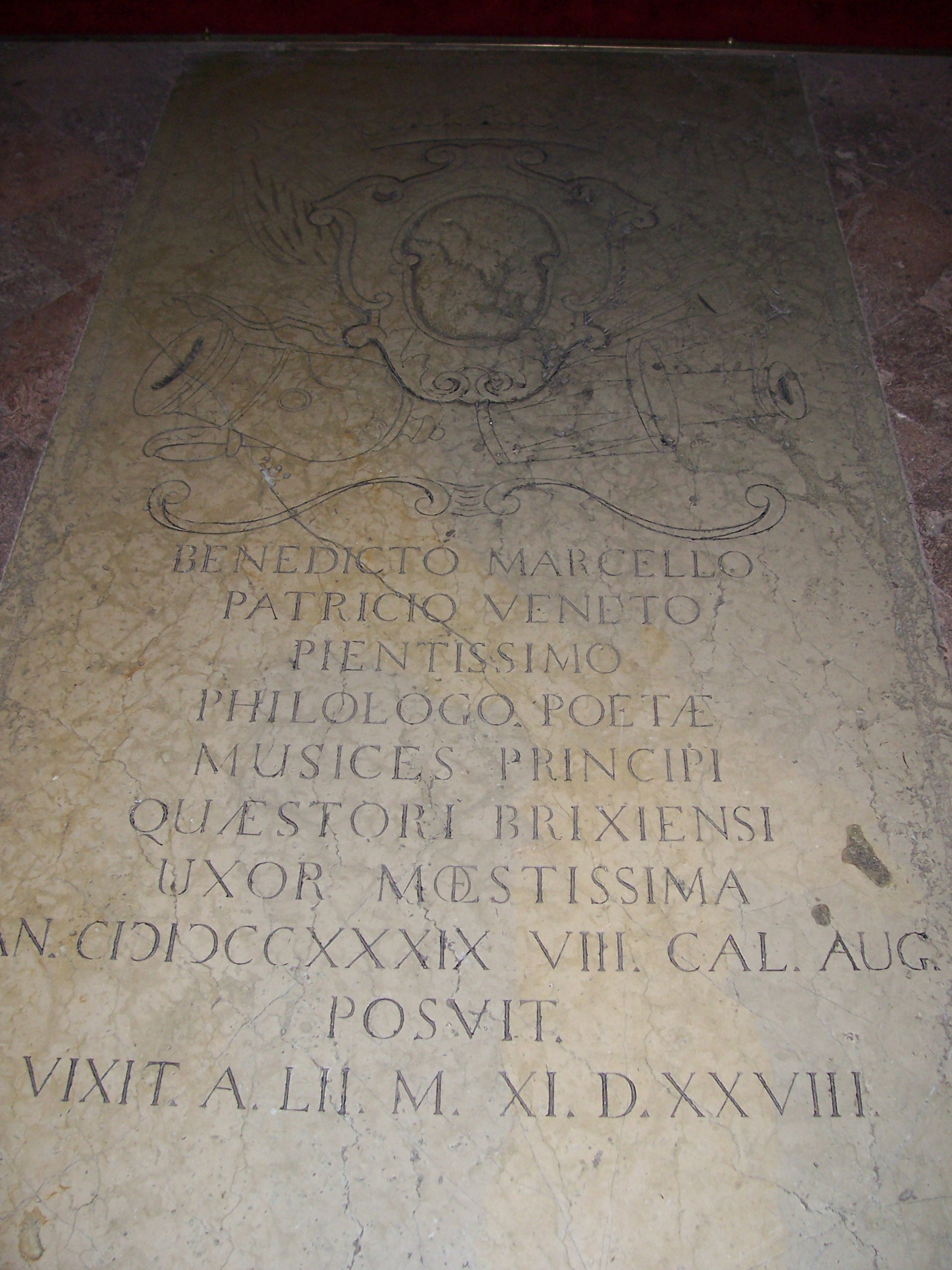 tomba di benedetto marcello nella chiesa di san giuseppe a brescia